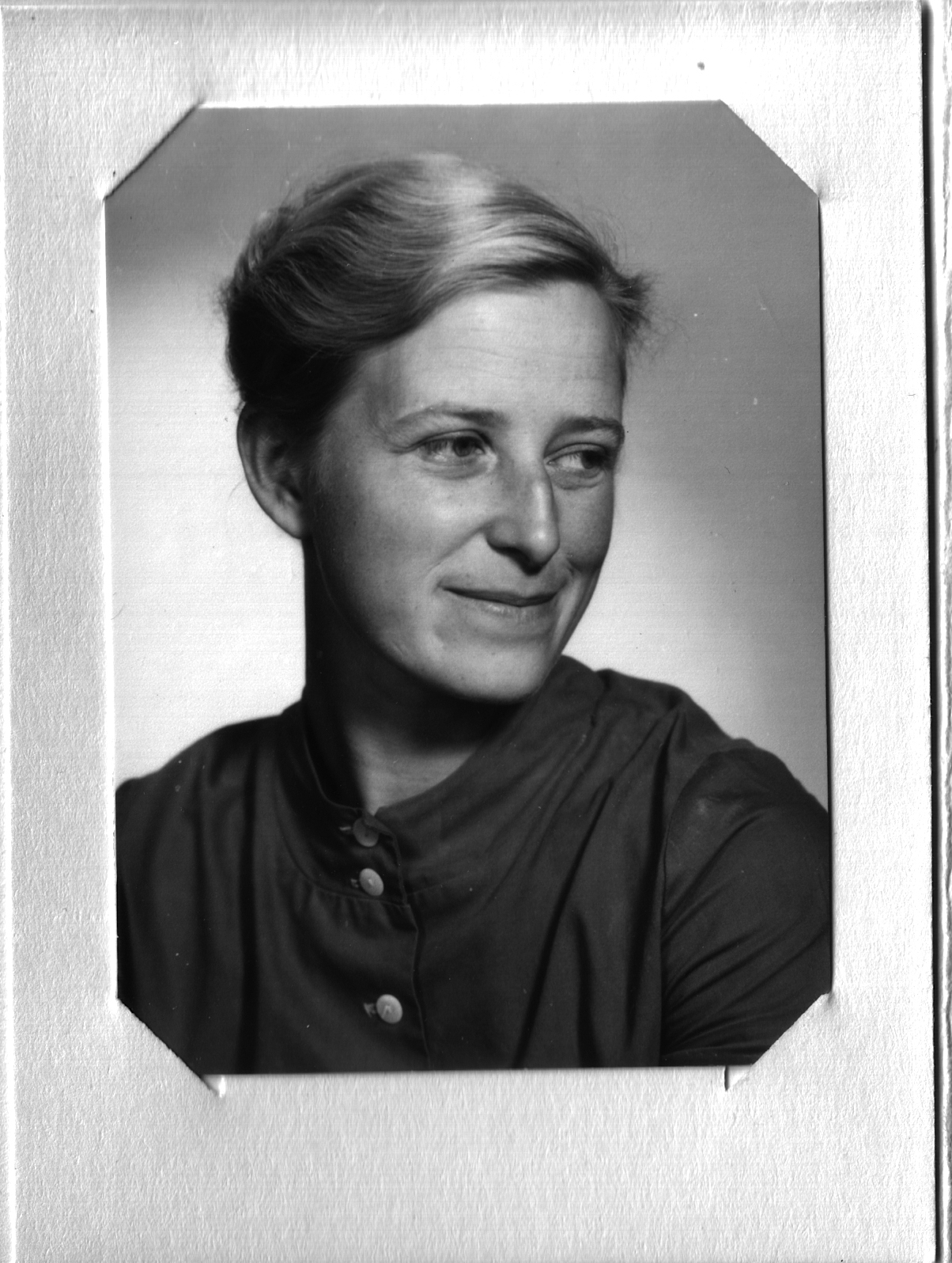 Molly Johnson vid tiden för debuten (kring 1955)